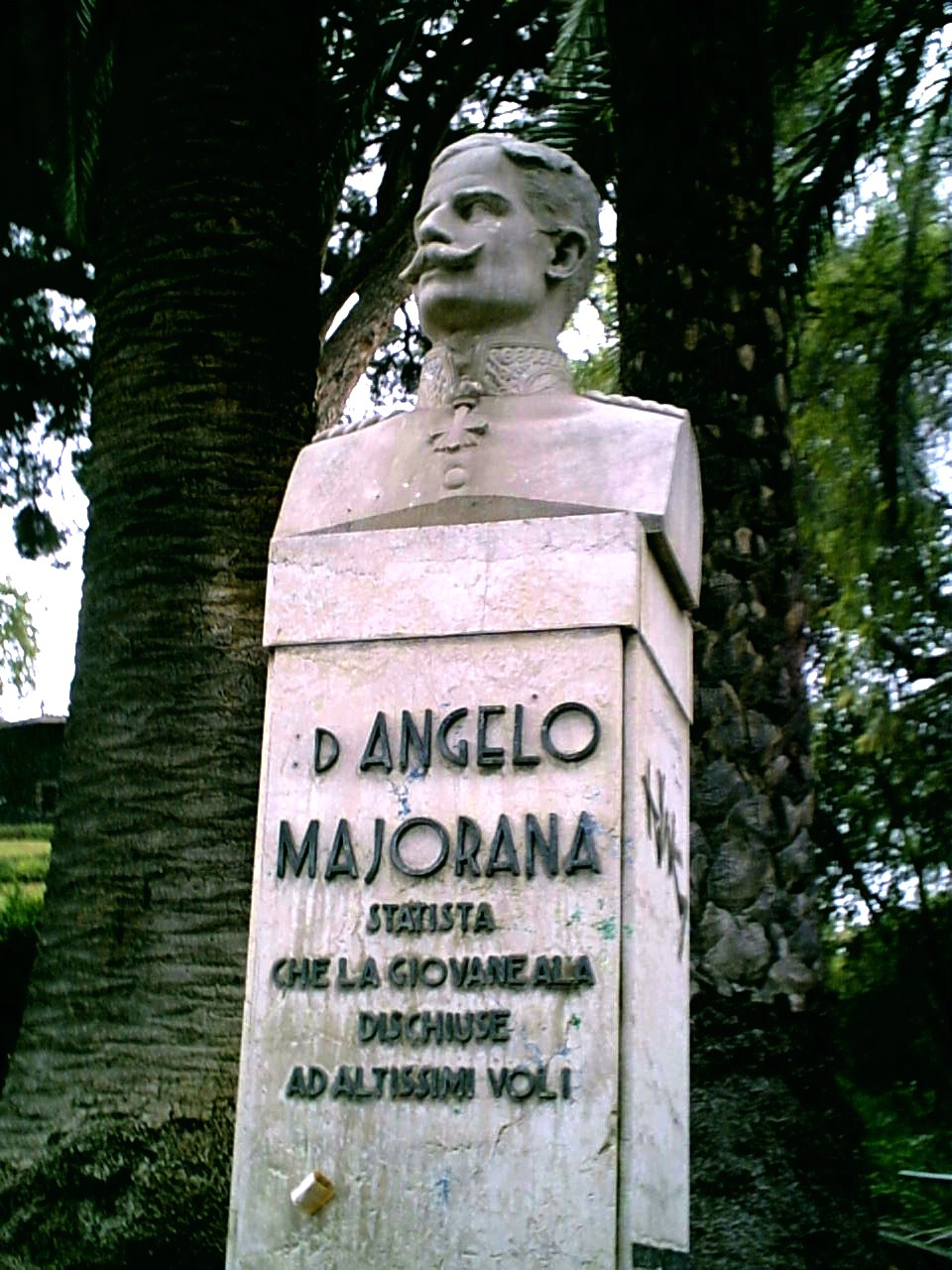 Villa Bellini,Busto di Angelo Maiorana